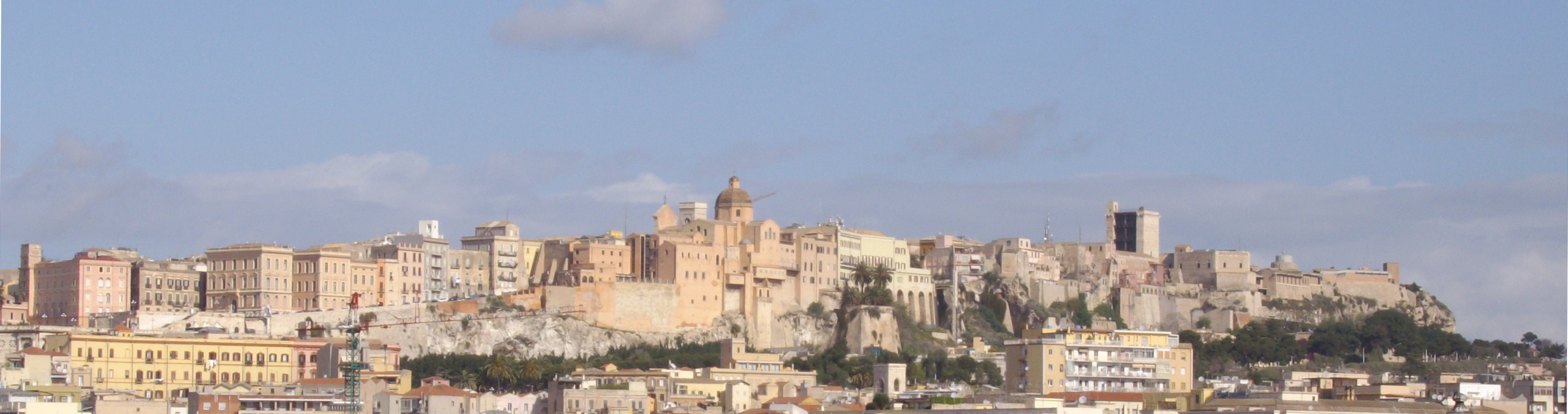 Quartiere Castello visto dal colle di Bonaria - Cagliari